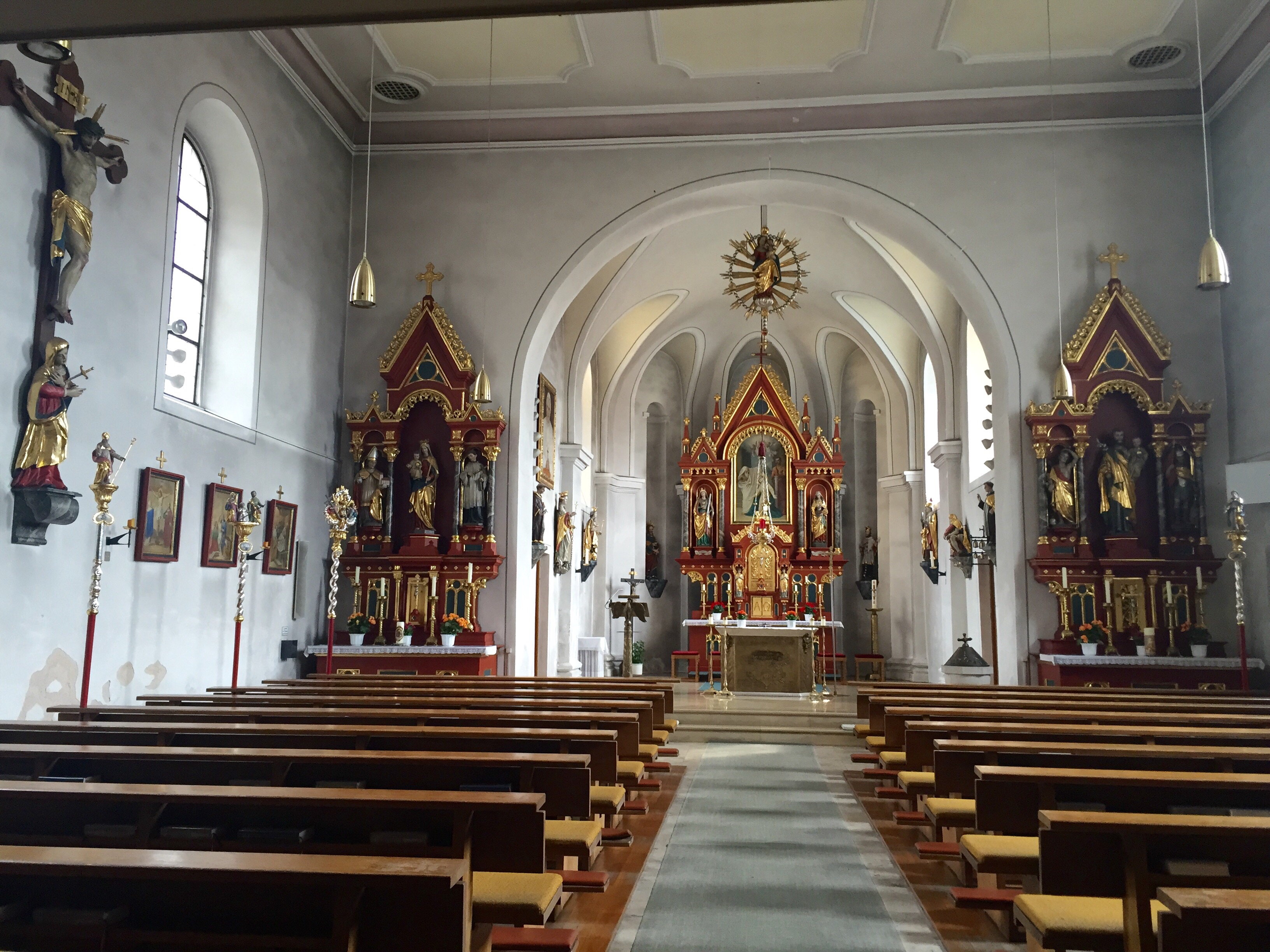 Innenansicht